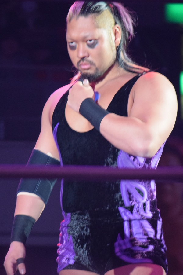 2016年2月11日 大阪府立体育会館 「THE NEW BEGINNING in OSAKA」 EVIL